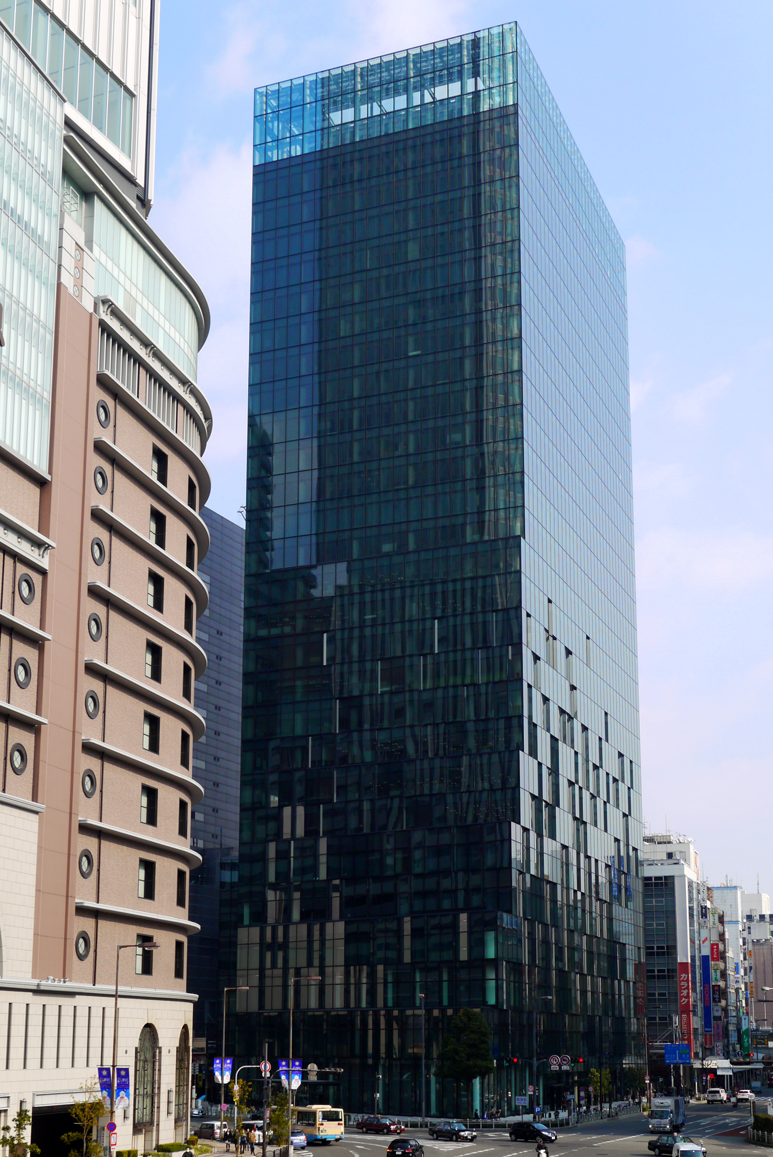 Osaka Fukoku Seimei Building (大阪富国生命ビル), Osaka, Osaka prefecture, Japan